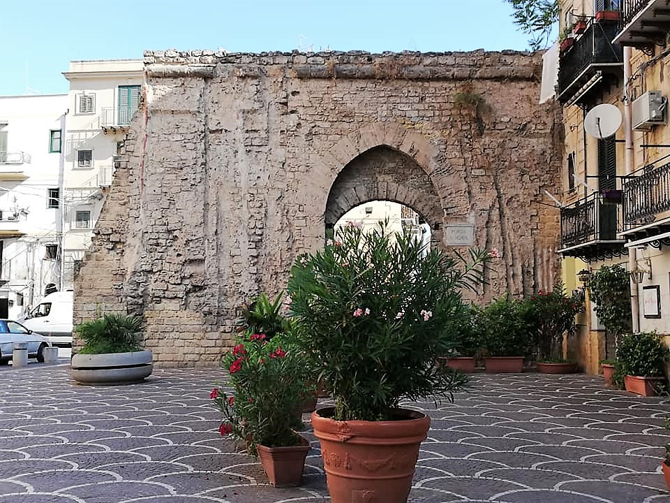 Arco, prospetto verso corso Tukory.